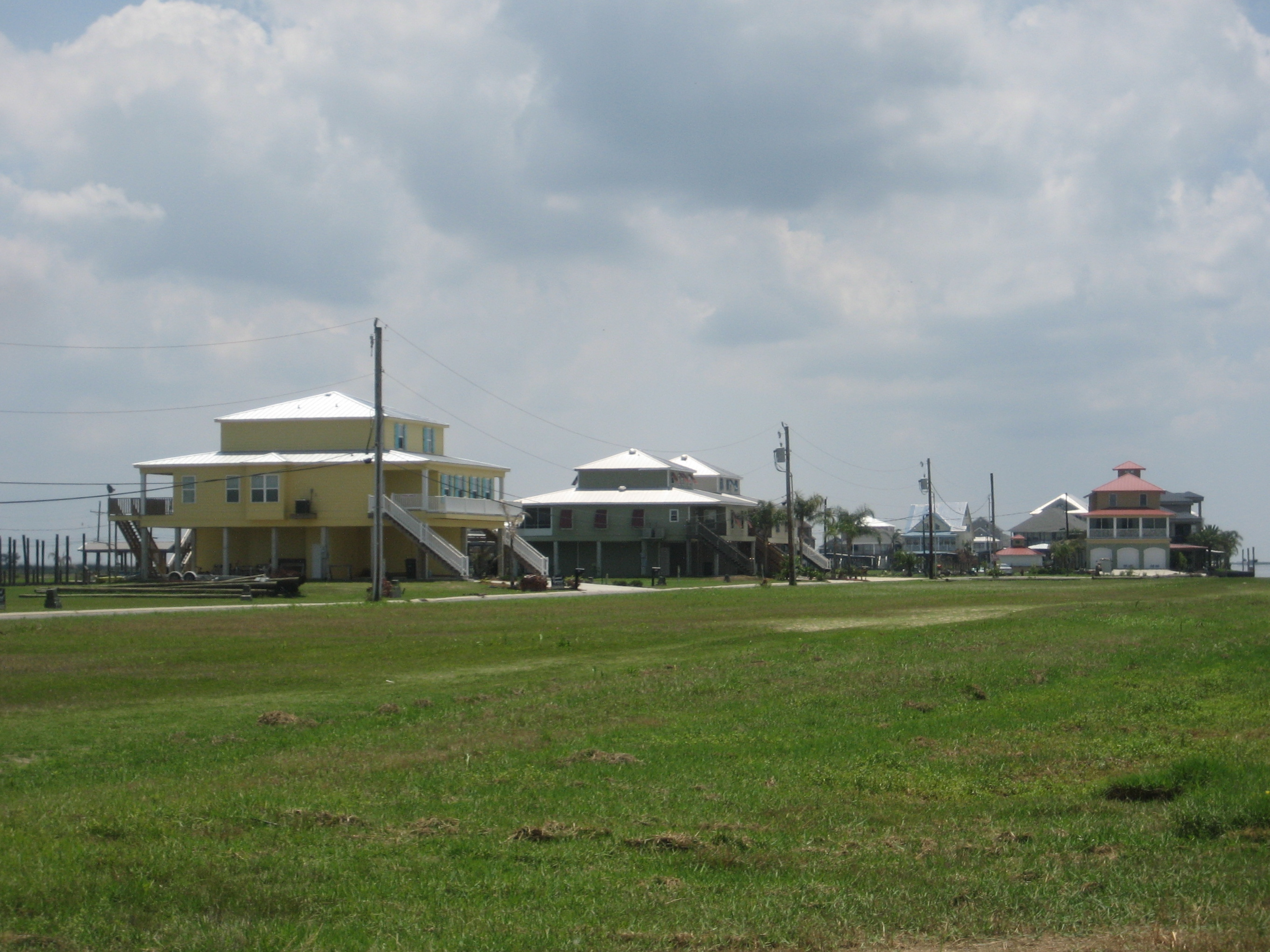 Myrtle Grove, Plaquemines Parish, Louisiana.